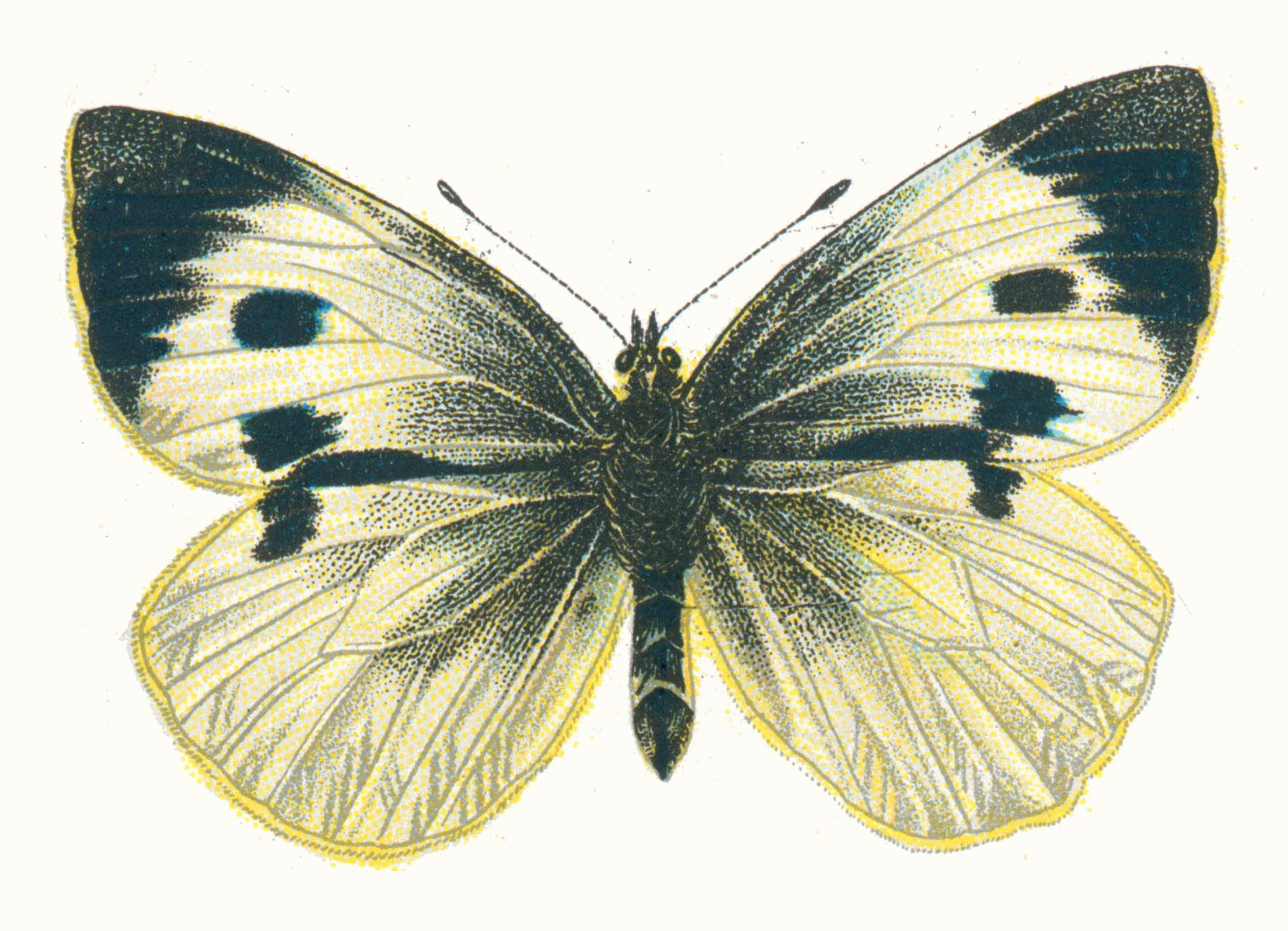 Pieris brassicae ♀